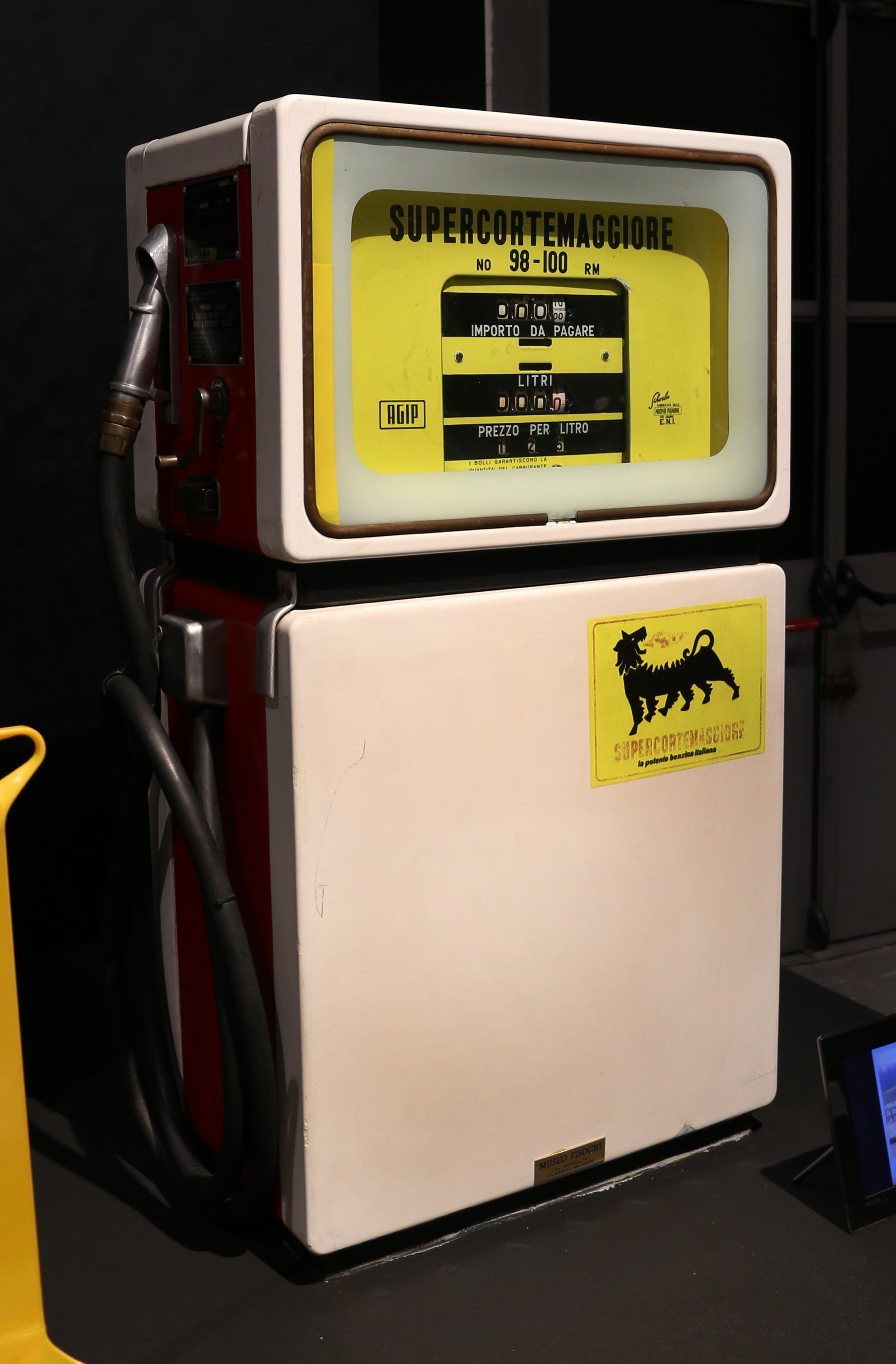 palazzo dell'Arte This is a photo of a monument which is part of cultural heritage of Italy.